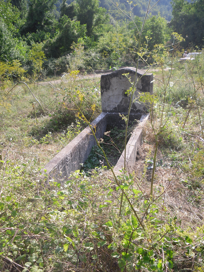 Селската чешма, Чука